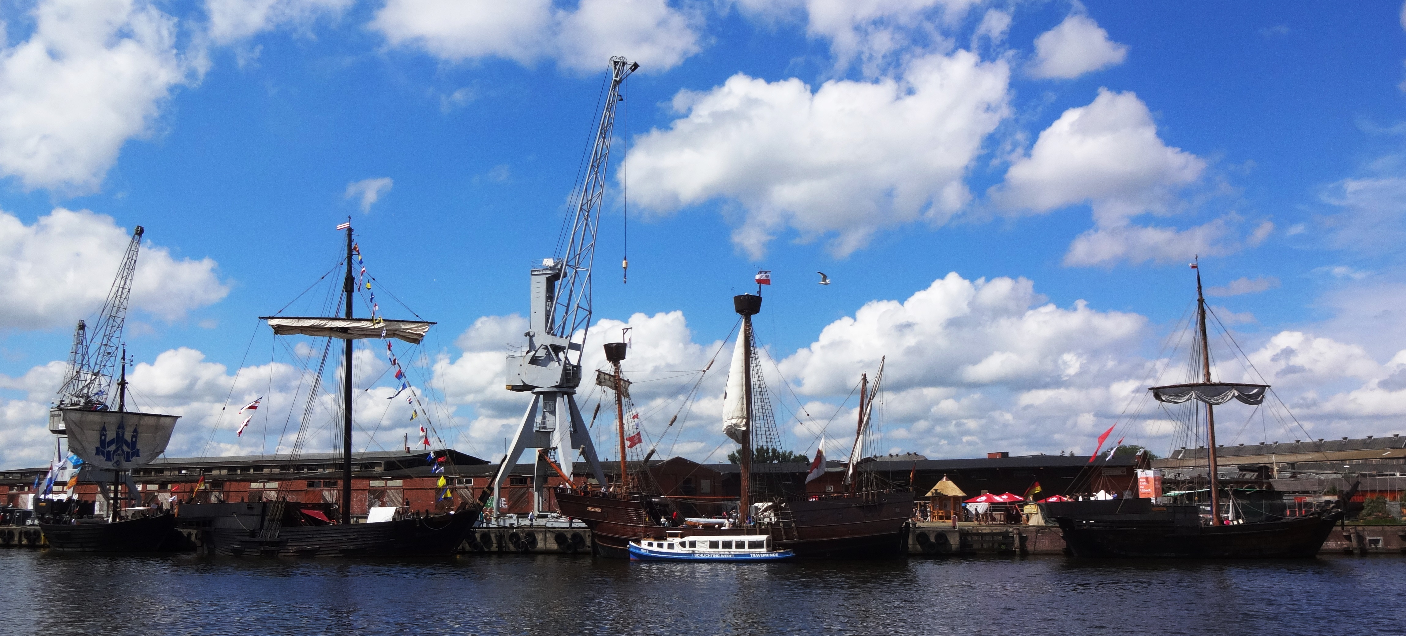 Nachbauten historischer Schiffe auf dem 34. Hansetag in Lübeck 2014